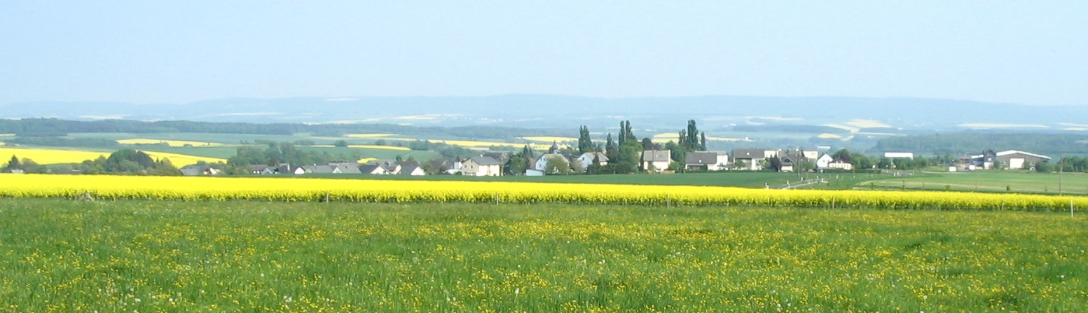 Reckershausen aus nördlicher Sicht